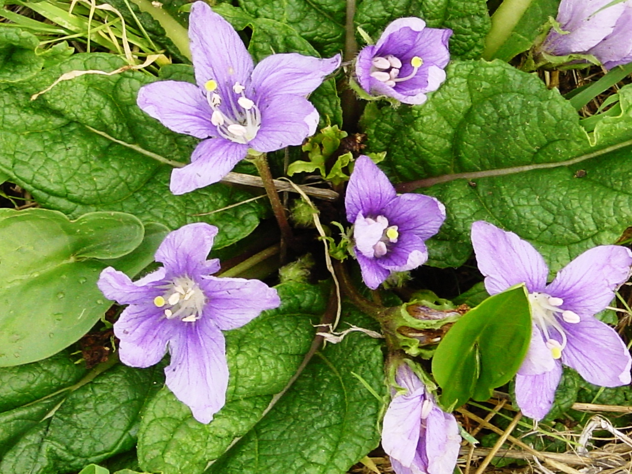 Mandragora autumnalis Bertol